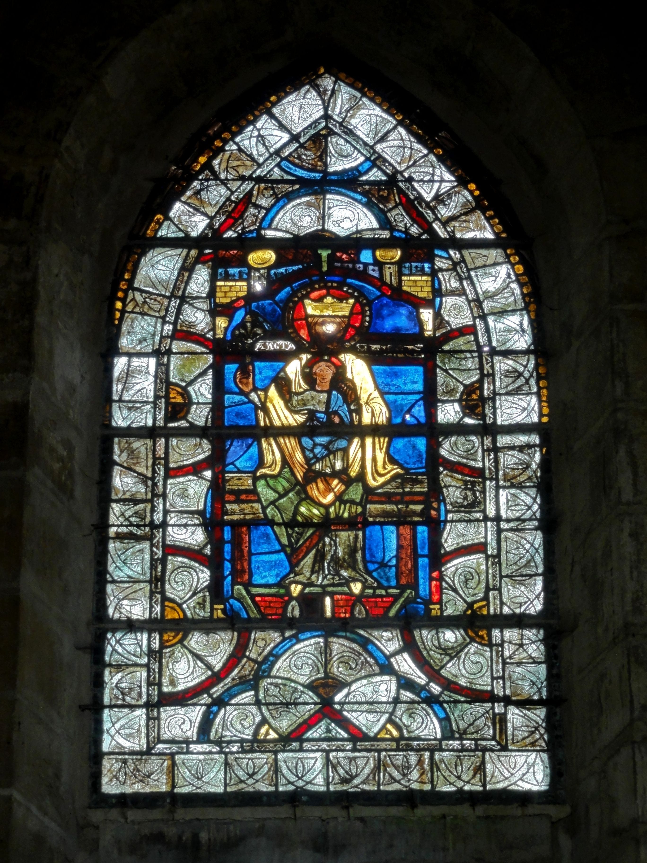 Fragment du dernier vitrail du XIIIe siècle, montrant la Vierge sur un trône, dans la baie du chevet de la chapelle latérale nord.